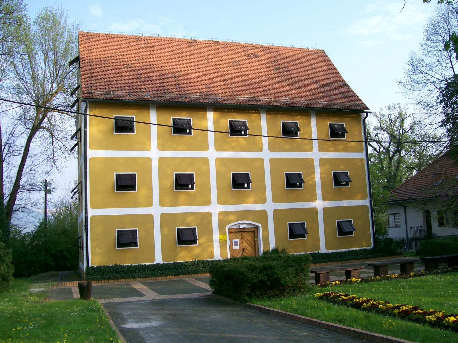 Muzej Matije Skurjeni, Zaprešić